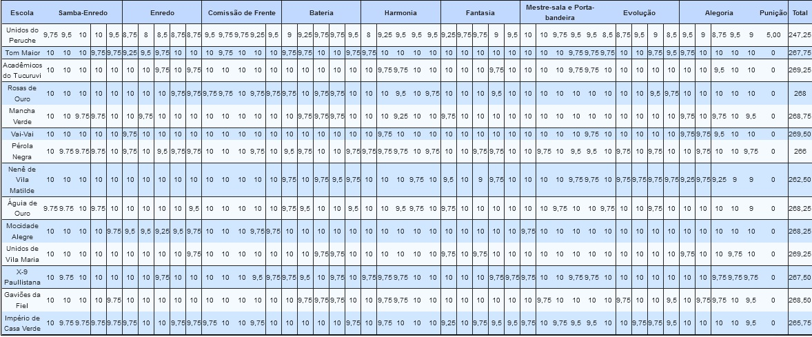 Resultados do Carnaval de São Paulo - 2011